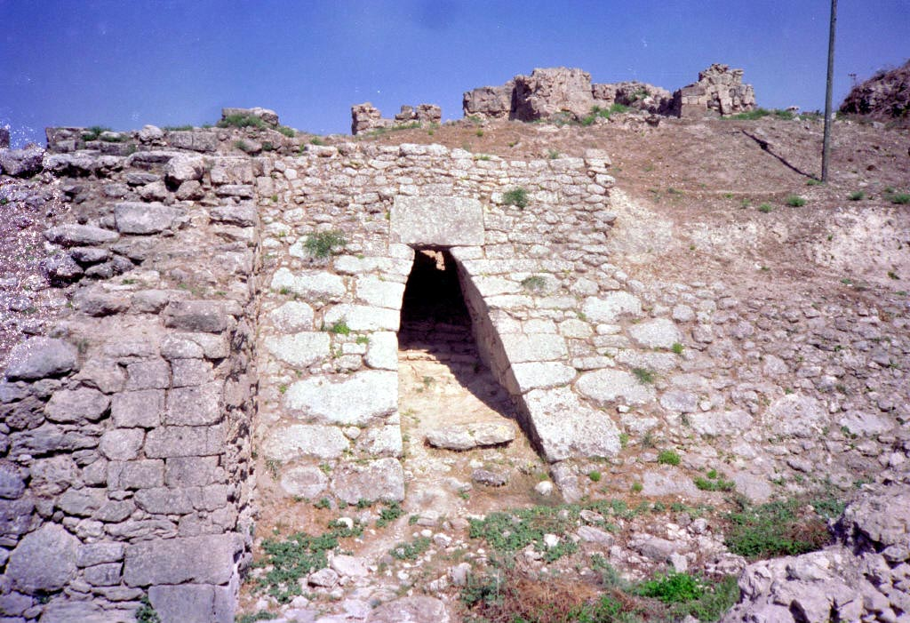 Entrée du site d'Ougarit (Ras Shamra) au nord de Latakieh (Côte syrienne) Photo prise en août 1989 M. Benoist